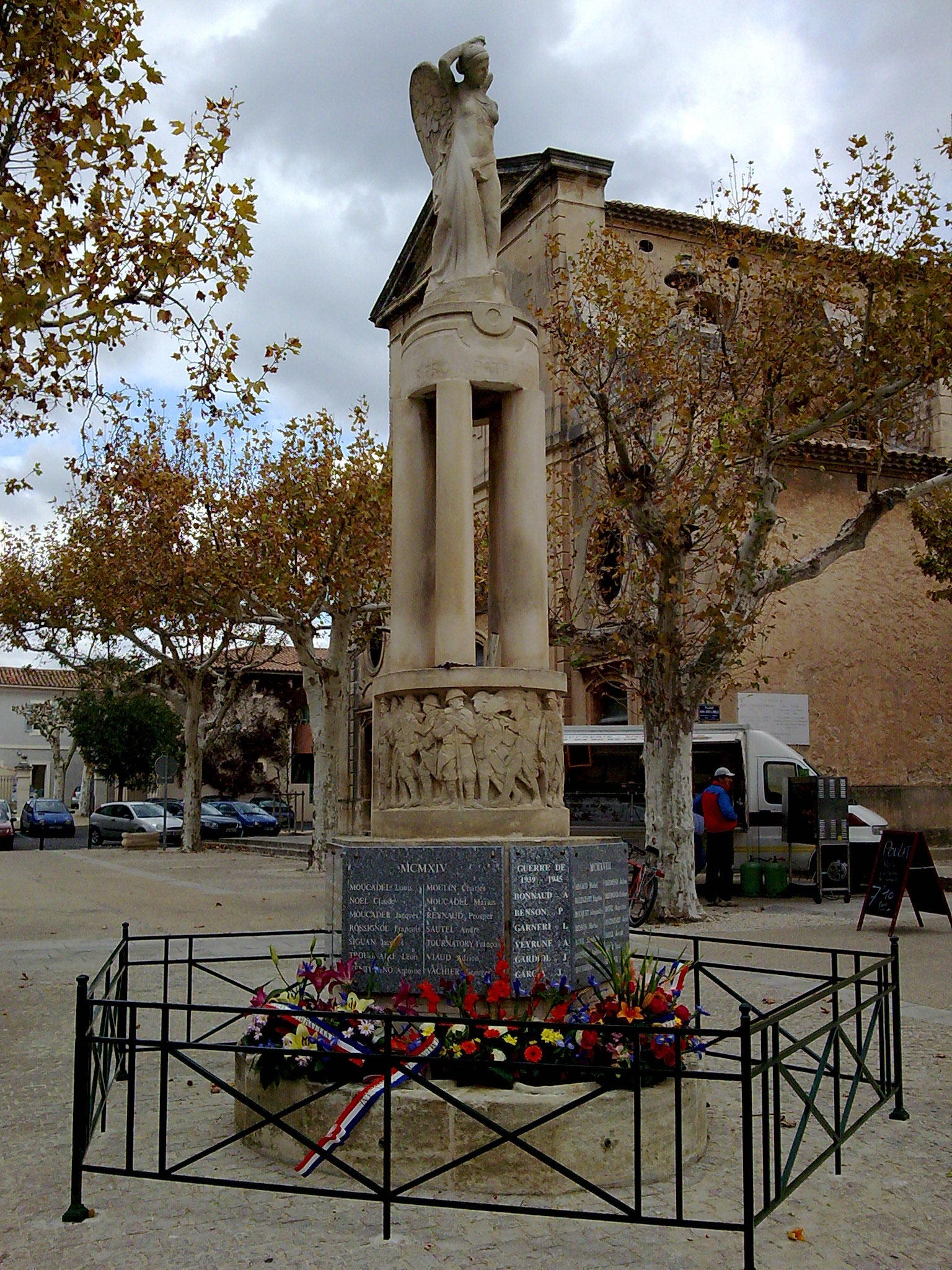 Monument aux morts de Maussane-les-Alpilles (Bouches-du-Rhône, France); Vernon Blake (1875-1930)